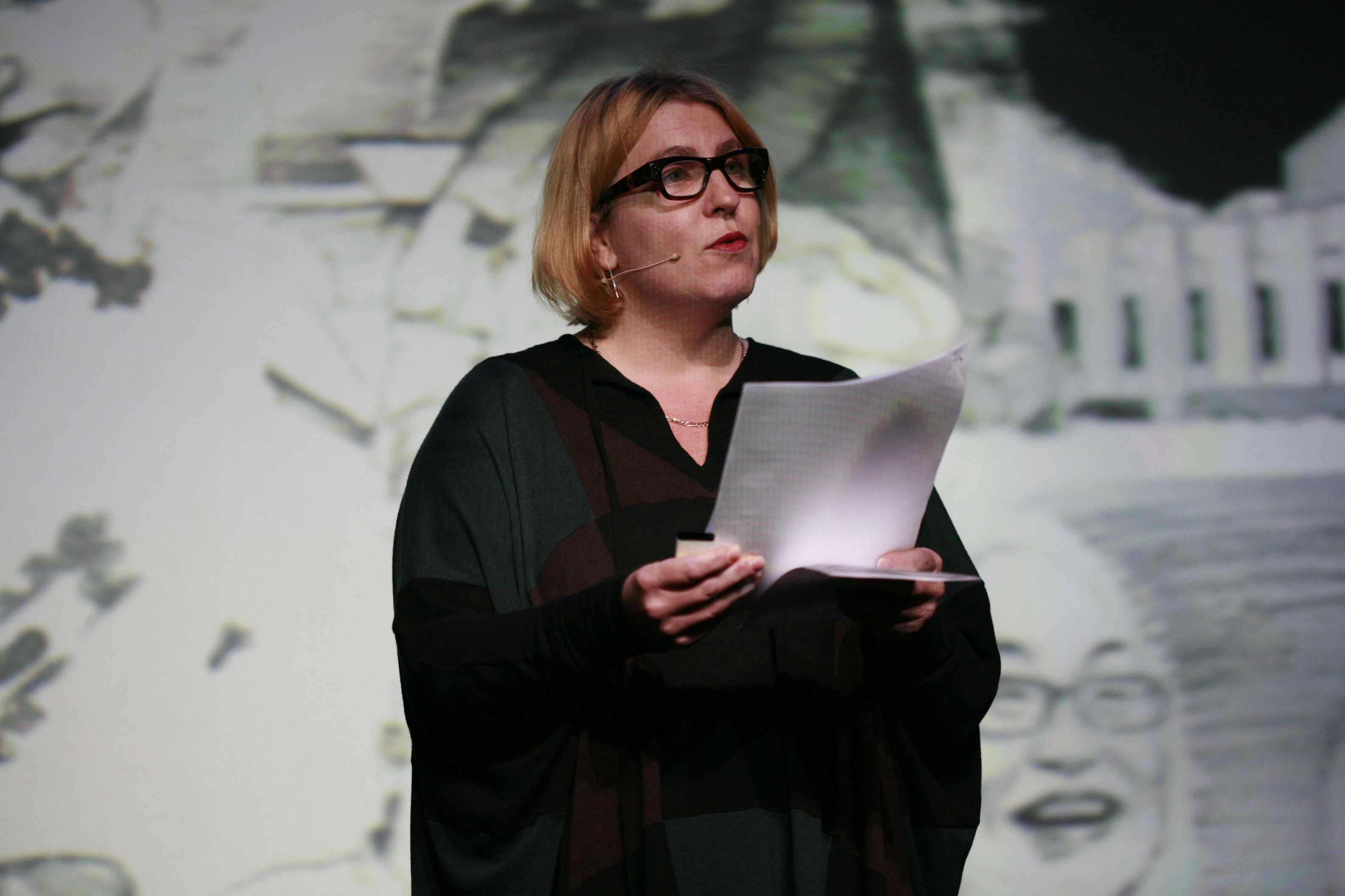 Mieke Gerritzen